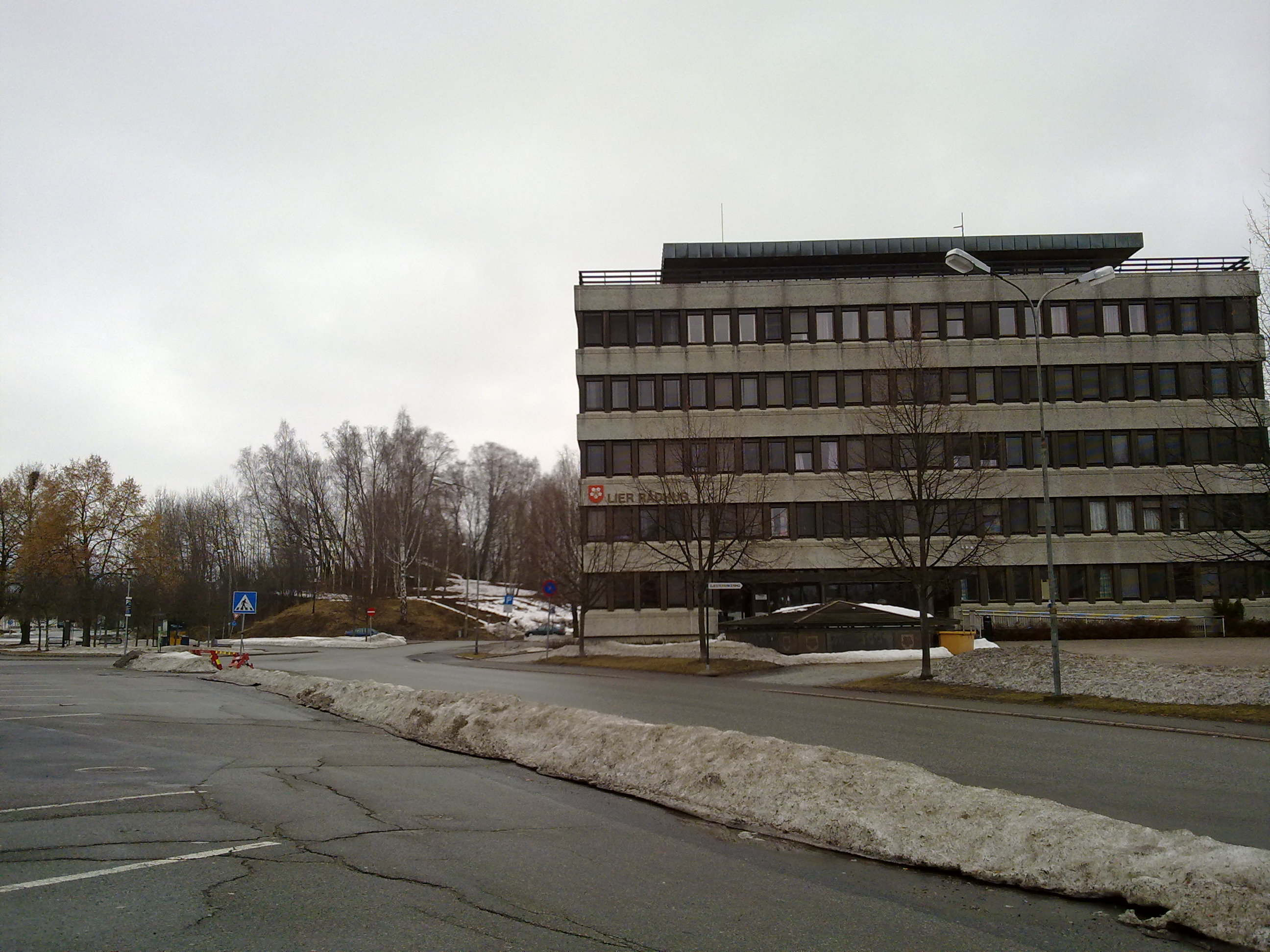 Rådhuset i Lierbyen